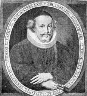 Johann Conrad Dannhauer (* 24. März 1603; † 7. November 1666), deutscher protestantischer Theologe